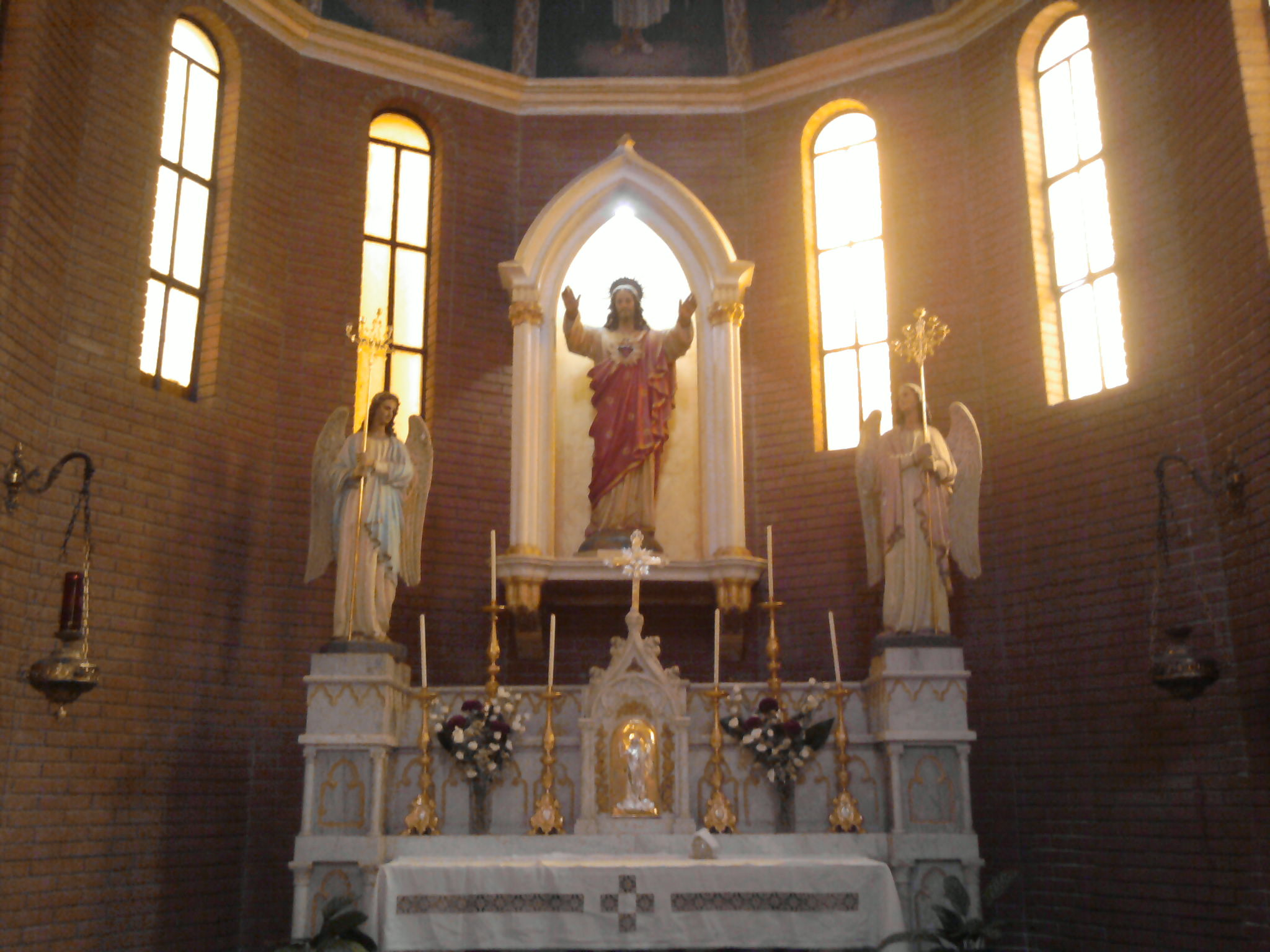 Statua del Sacro Cuore di Gesù conservata nella Concattedrale di San Nicola a Palmi